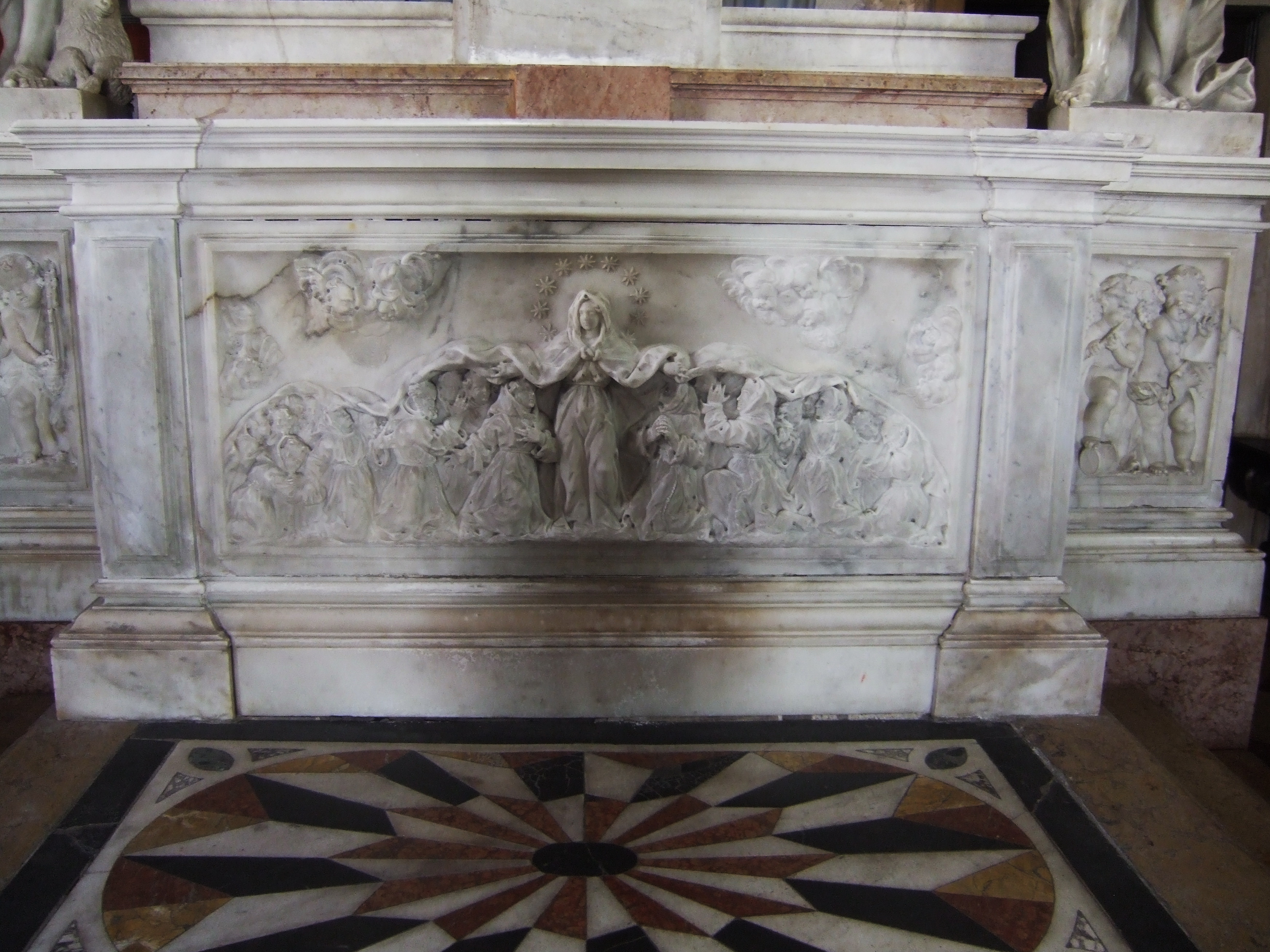 San Vito al Tagliamento - Chiesa di Santa Maria dei Battuti Particolare dell'altare